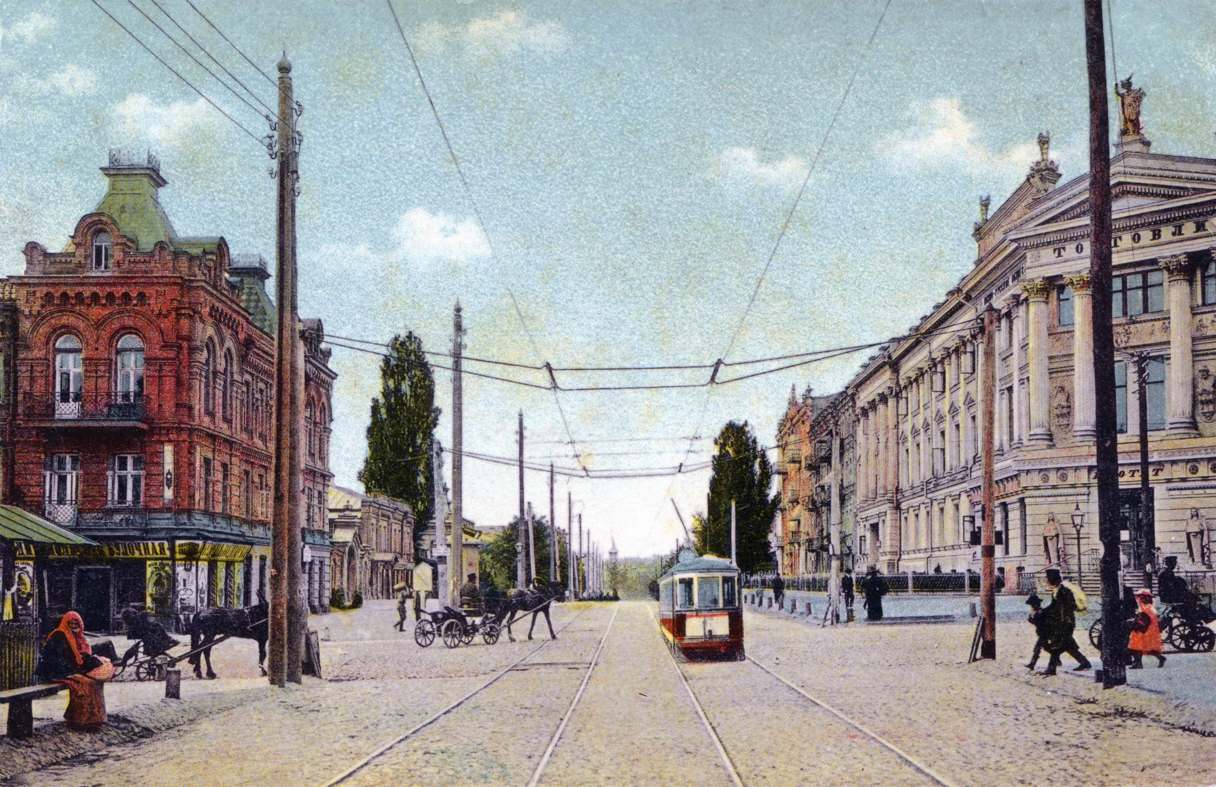 Будинок товариства торгівлі аптекарськими товарами (справа), Київ, Вулиця Симона Петлюри, 16/108